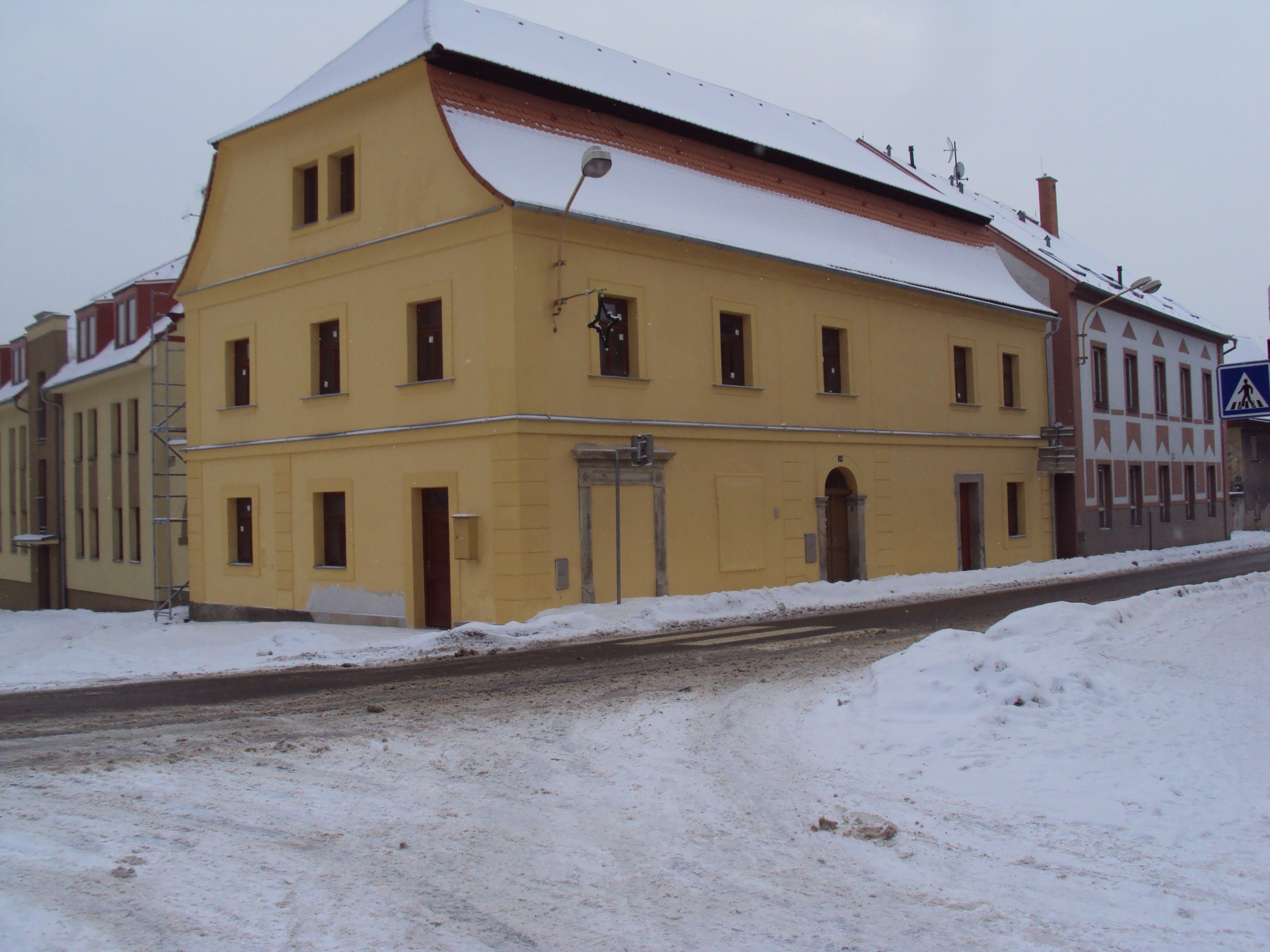 Rohový dům na zákupském náměstí